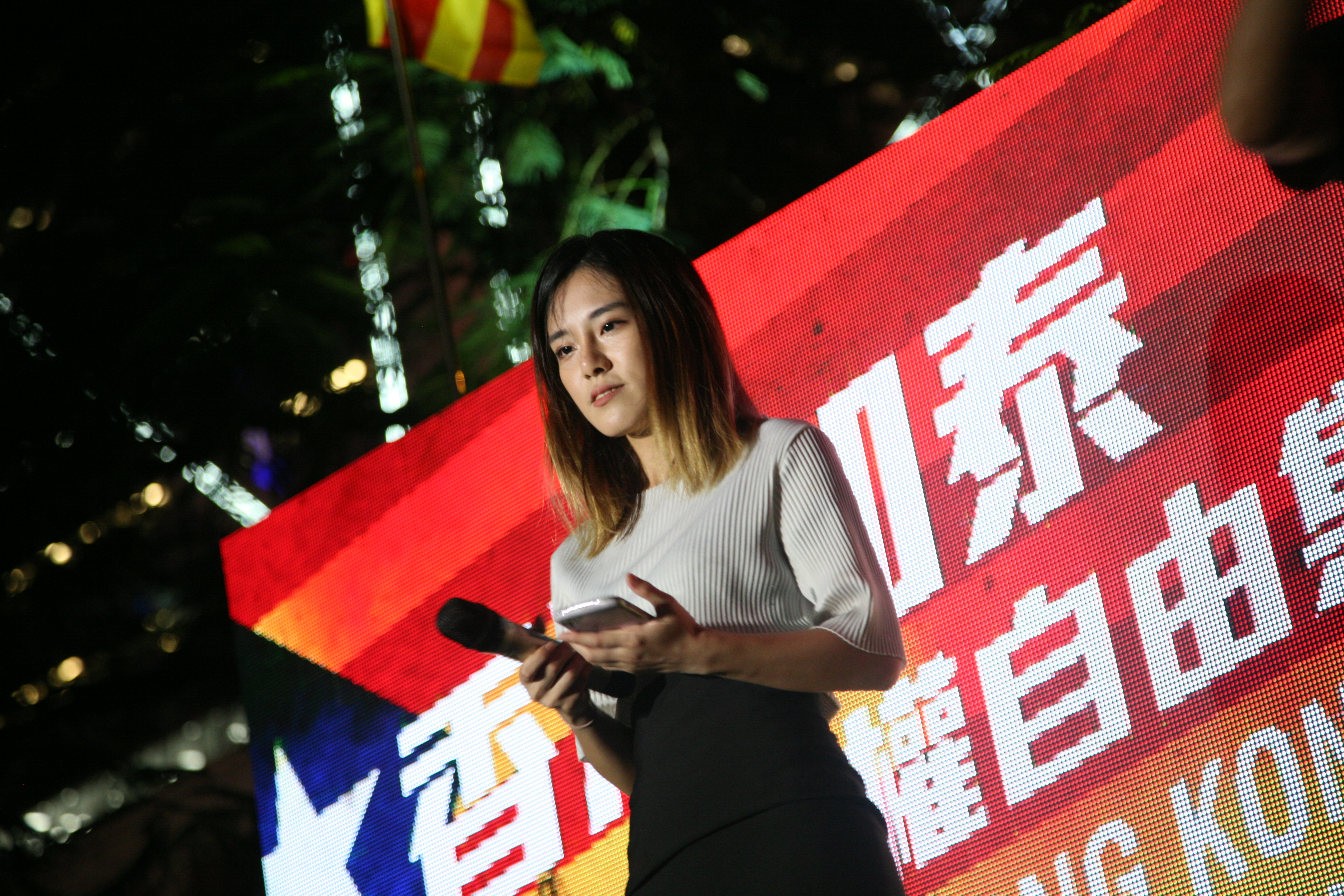 粵語: 黃子悅喺香港加泰人權自由集會。